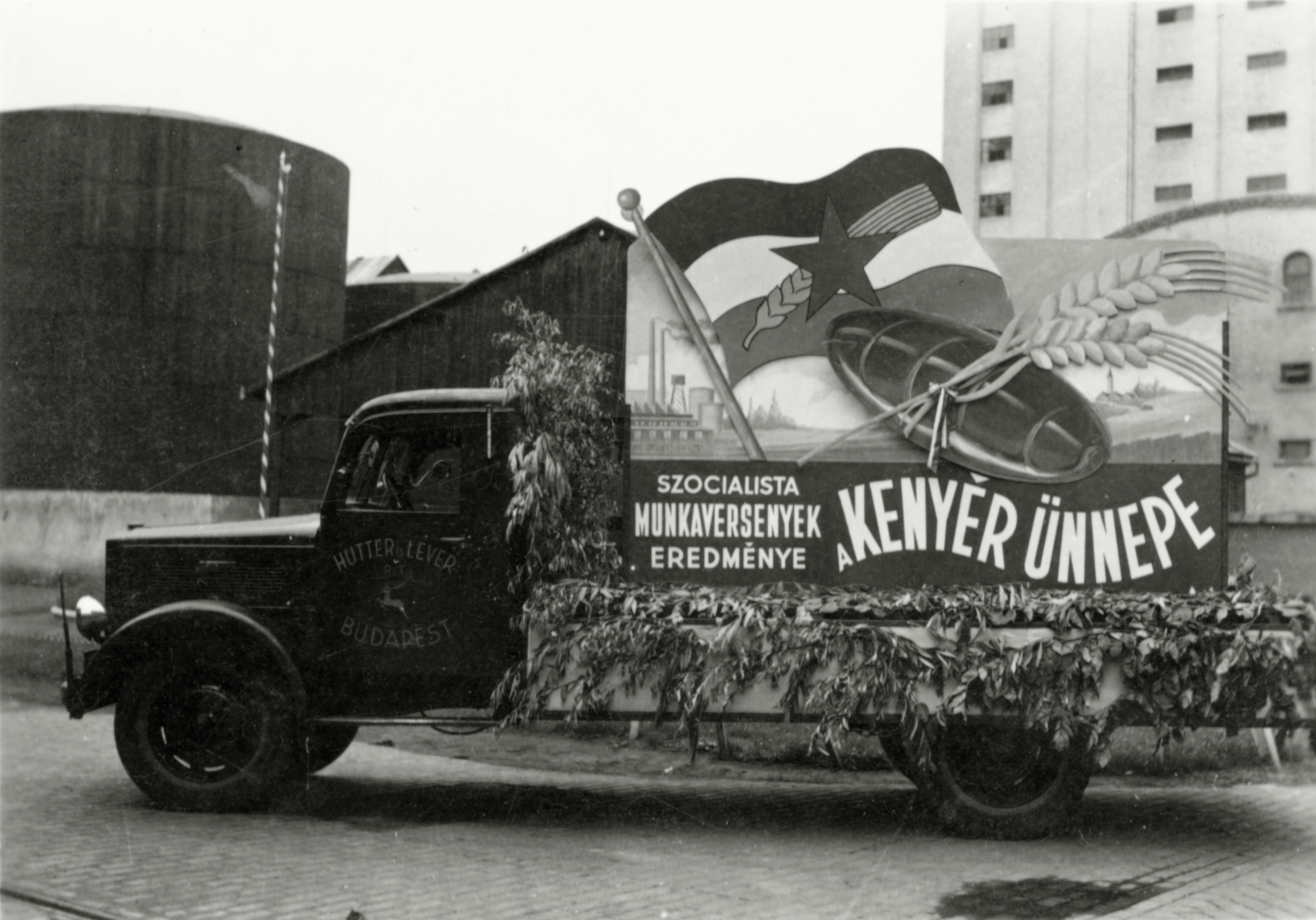 Kommunista propaganda plakát egy teherautón. Szöveg: Szocialista munkaversenyek eredménye a kenyér ünnepe